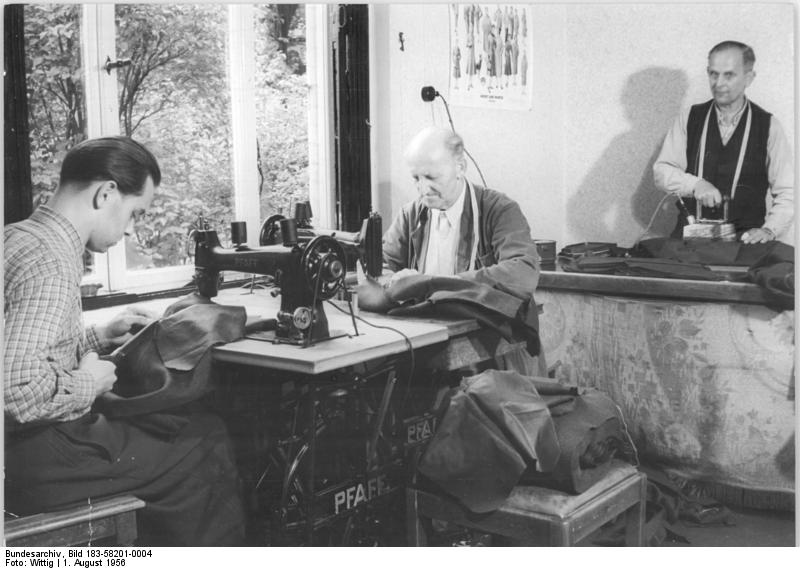 Zentralbild-Erfurt-Wittig-Zi-Qu 1.8.1956 14 Mann und eine Werkstatt Gothaer Schnerdermeister und -gesellen gründeten am 6. Juli 1956 die Produktionsgenossenschaft des Schneiderhandwerks vom Typ II und die 3. in ihrer Art in unserer Republik. Ab 1.9.1956 wird mit einer planmässigen Lehrlingsausbildung begonnen. Die Genossenschafter fertigen Maßkonfektion und Maßarbeit Güteklasse I an. Die jungen Genossenschaft, die hauptsächlich für private Kundschaft arbeitet, hat auch eine Globalvertrag über die Herstellung von Maßkonfektion in der geschätzten handwerklichen Qualität mit der No und mit dem Komsum UBz. Die Brigade II v.l.nr. : Geselle Erwin Hänlein Schneidermeister Heinrich Körner und der ehemals selbständige Herrenschneider Fritz Richter.